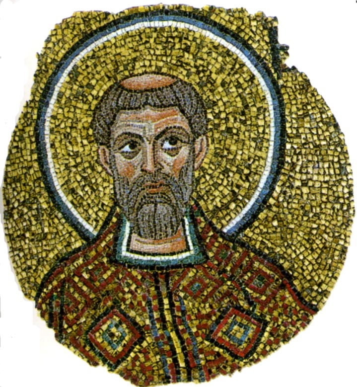 Св. Варвациан (Барвациан) Равеннский. Мозаика. Происходит из кафедрального собора Равенны (Урсианова базилика. Агиа Анастасис). Равенна. Италия. XII в. Архиепископский музей. Равенна.